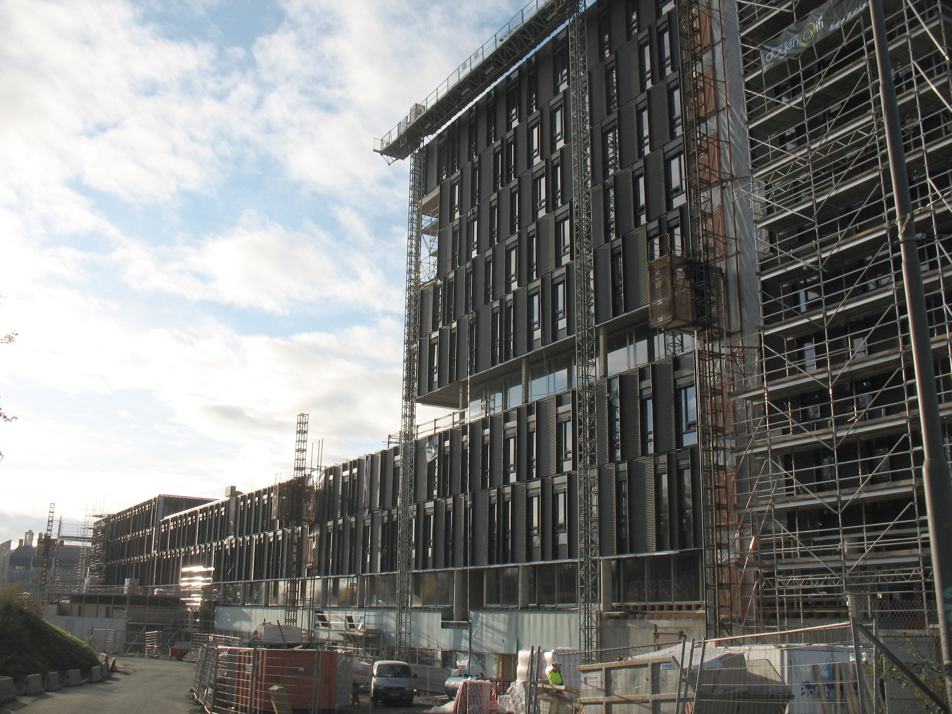 Ifi2, det nye informatikkbygget ved Universitetet i Oslo.